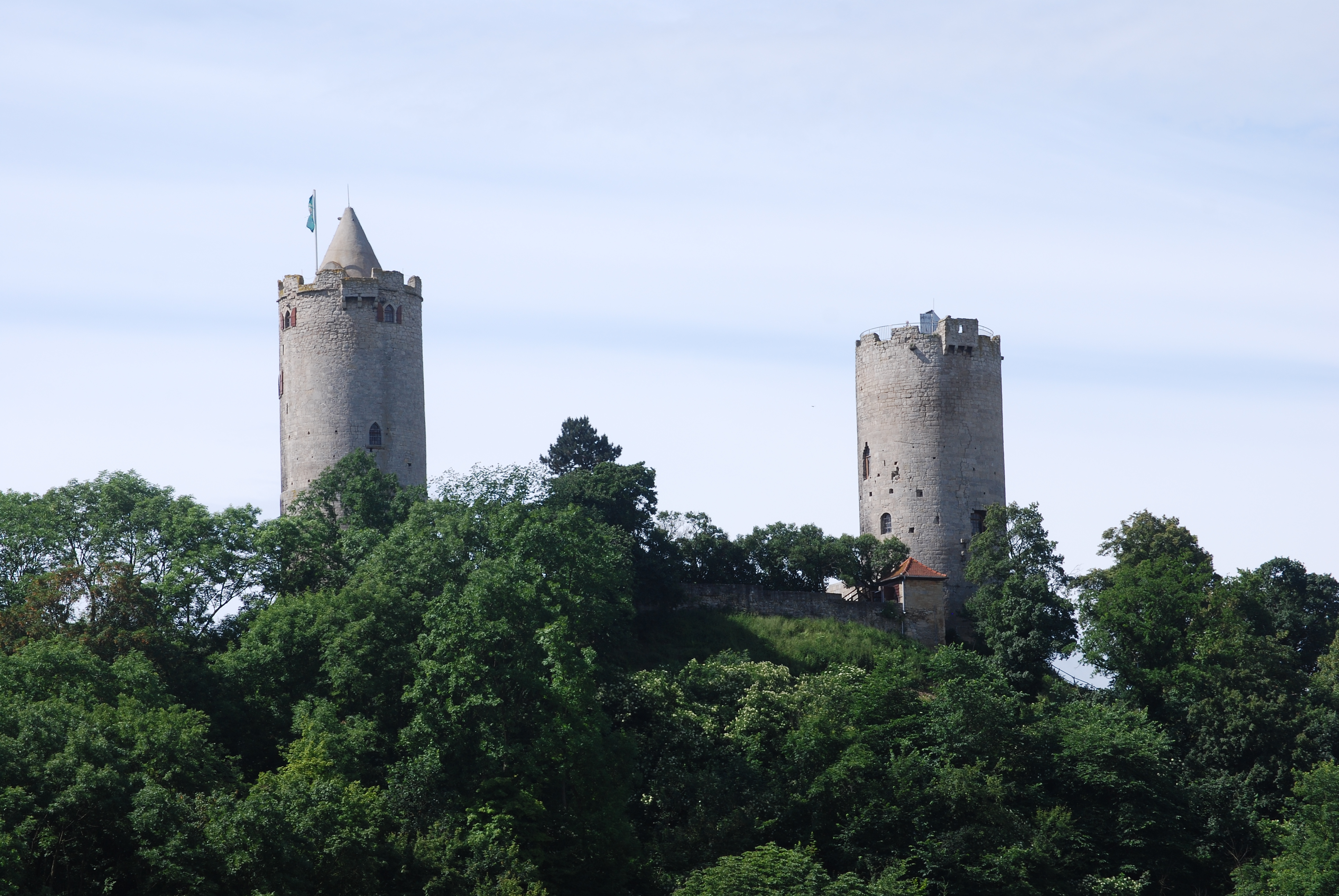 Burg Saaleck bei Bad Kösen